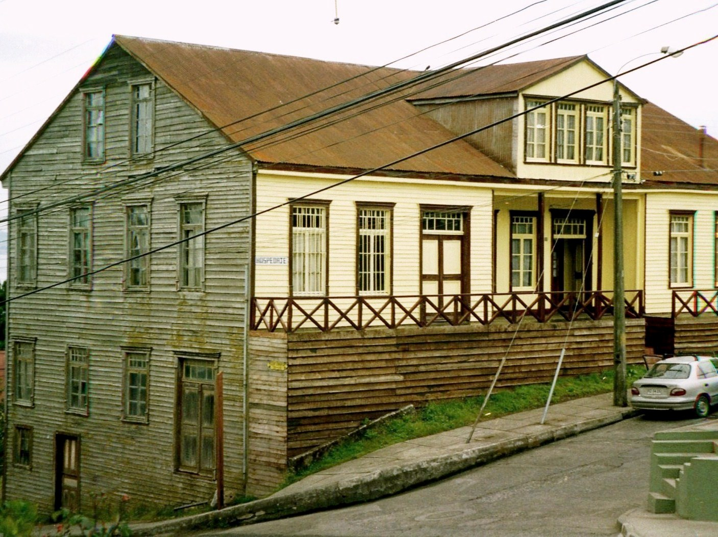 Chonchi - Isla de Chiloe